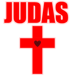 Logo de "Judas", sencillo de Lady Gaga.